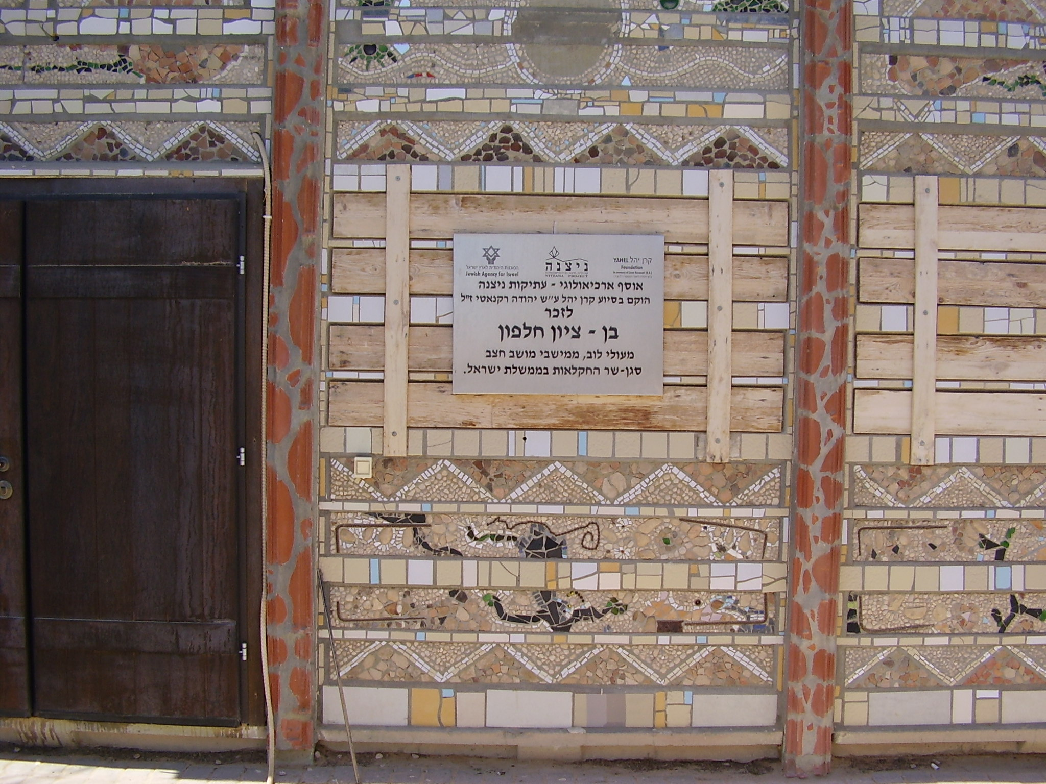 המוזיאון הארכאולוגי על שם בן ציון חלפון, בכפר הנוער ניצנה